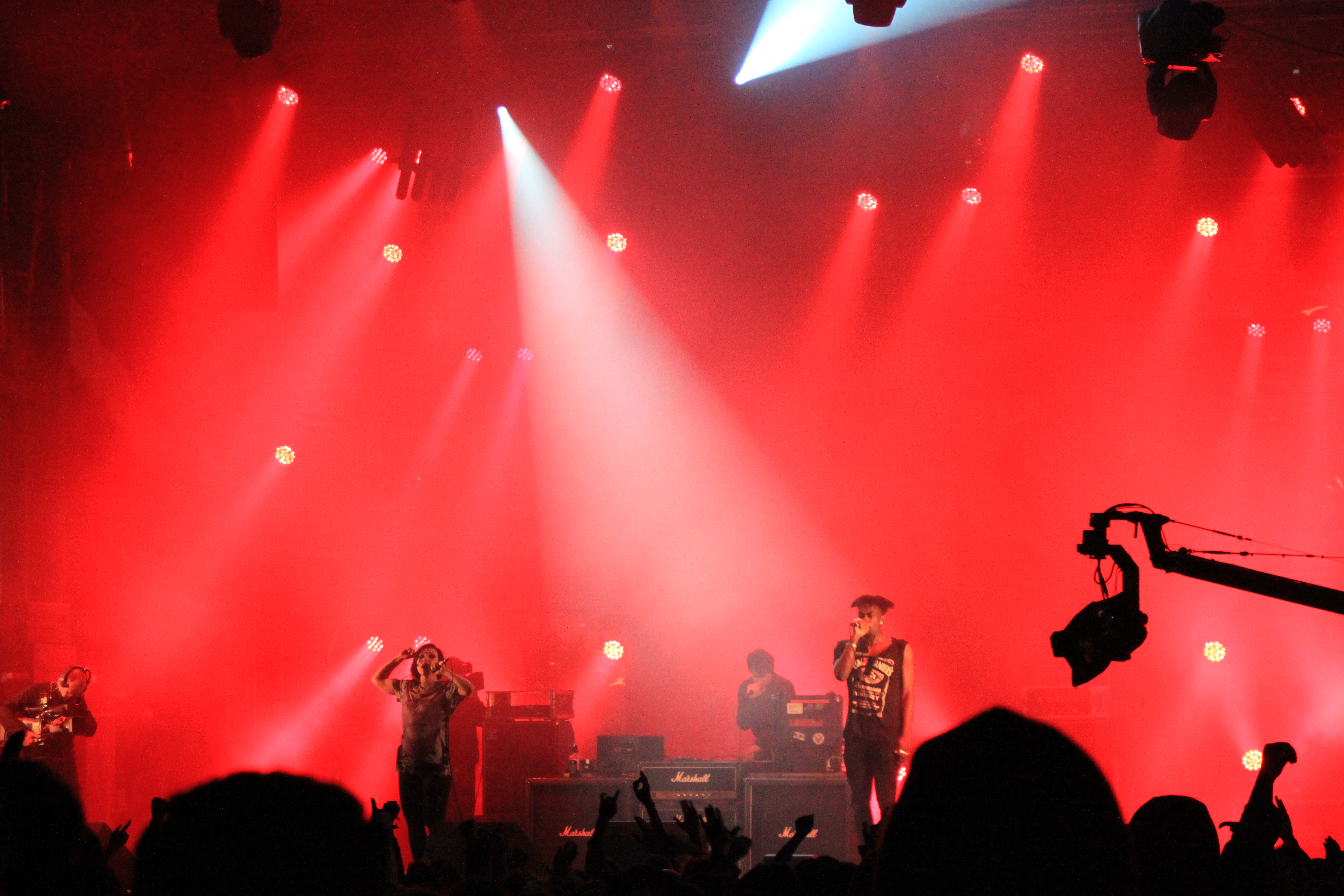 Atari Teenage Riot, Helfest 2013, Fr-44-Clisson.